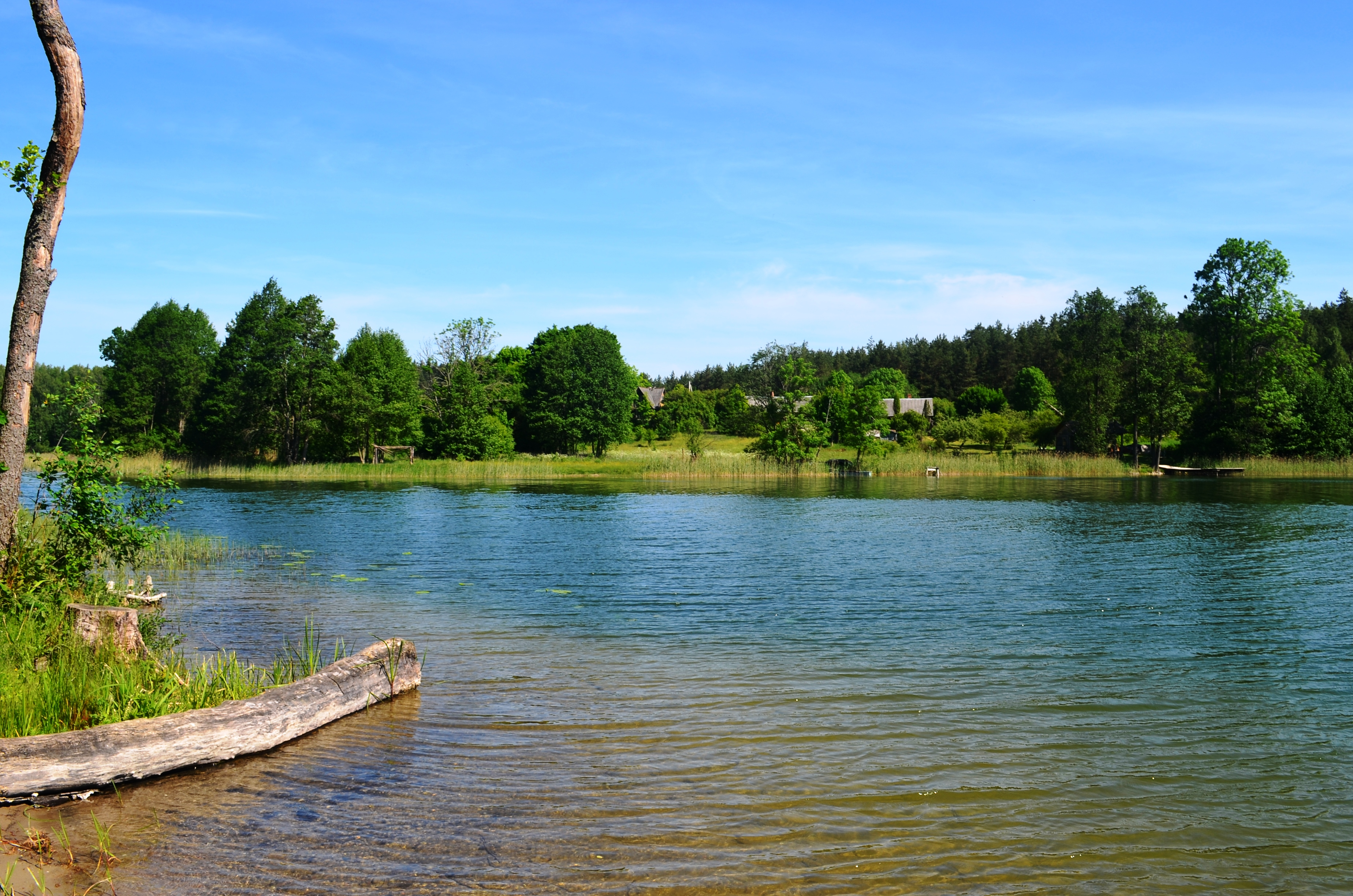 Asvejos ežeras priešais Alkos kaimą, Vilniaus, Molėtų ir Švenčionių r. sandūra